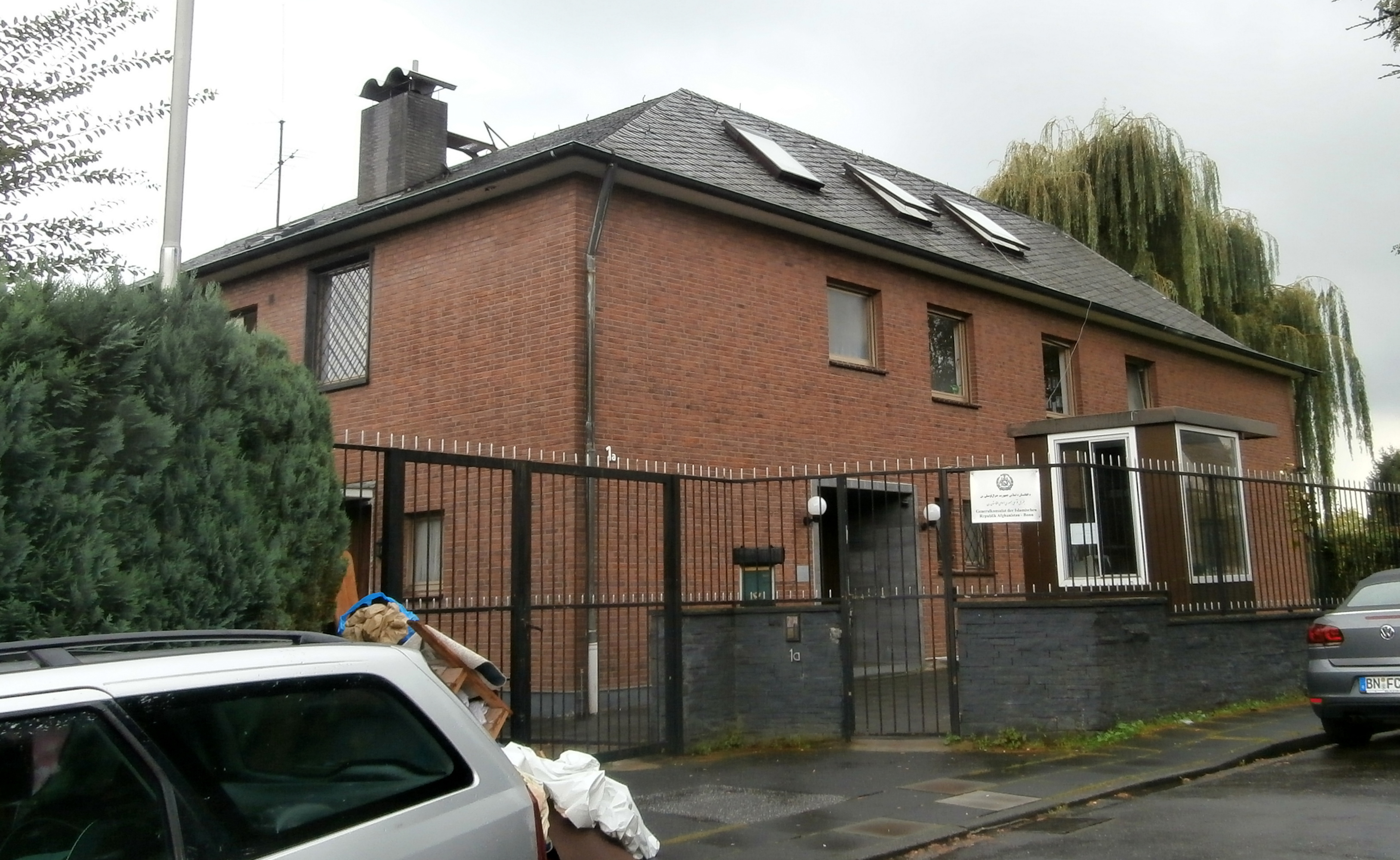 Generalkonsulat und ehemaliges Kanzleigebäude der Botschaft von Afghanistan, Liebfrauenweg 1a, Bonn-Ückesdorf